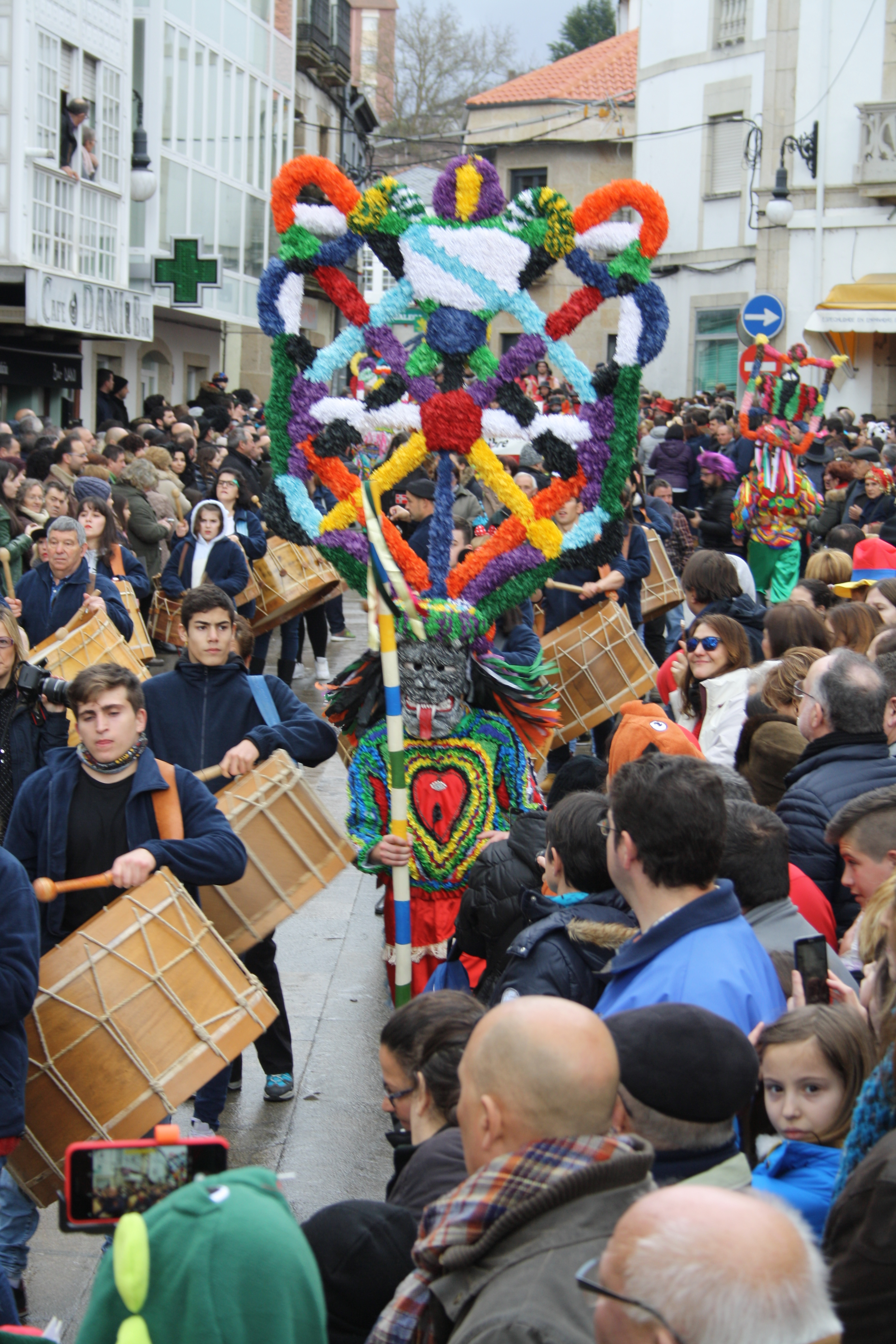 Entroido de Viana do Bolo 2018.